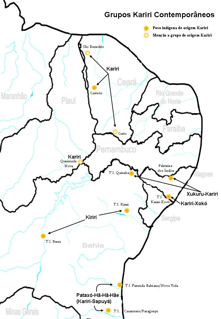 Mapa indicando os grupos Kariri atuais